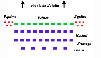 Colocación en el campo de batalla de la típica legión manipular.